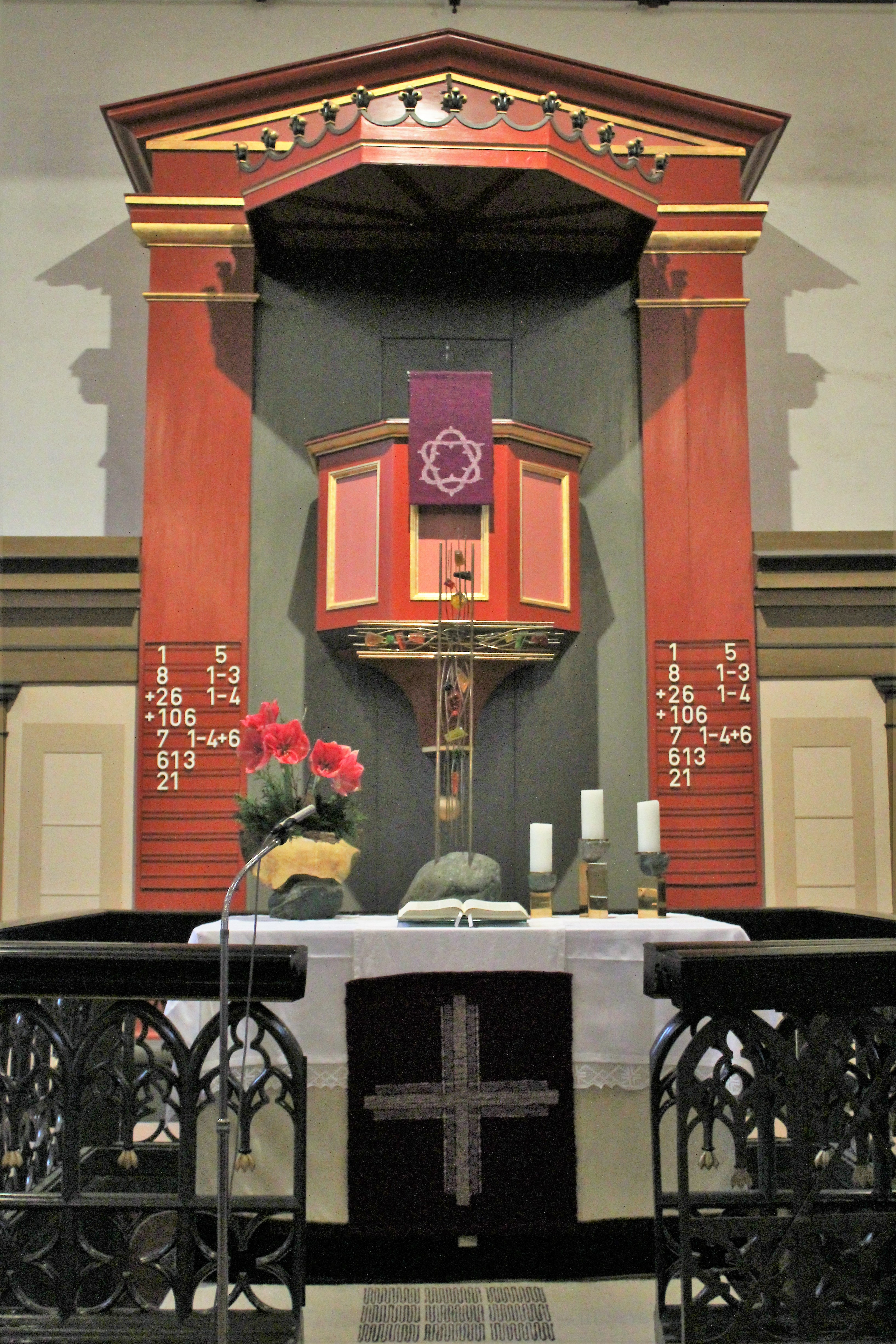 Evangelische Kirche Niedergründau, Gemeinde Gründau, Main-Kinzig-Kreis, Hessen, Deutschland